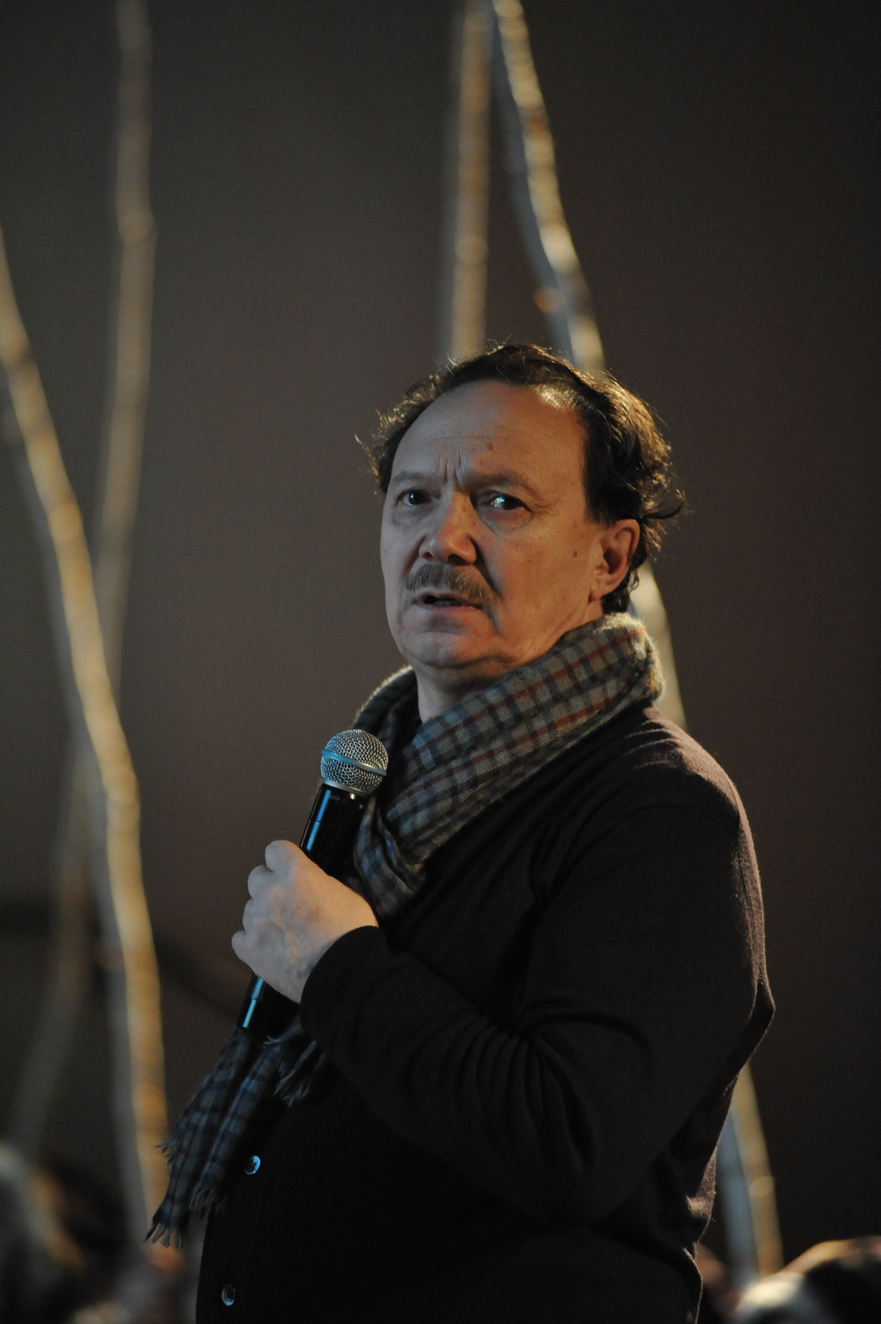 Андрей Саввич Борисов